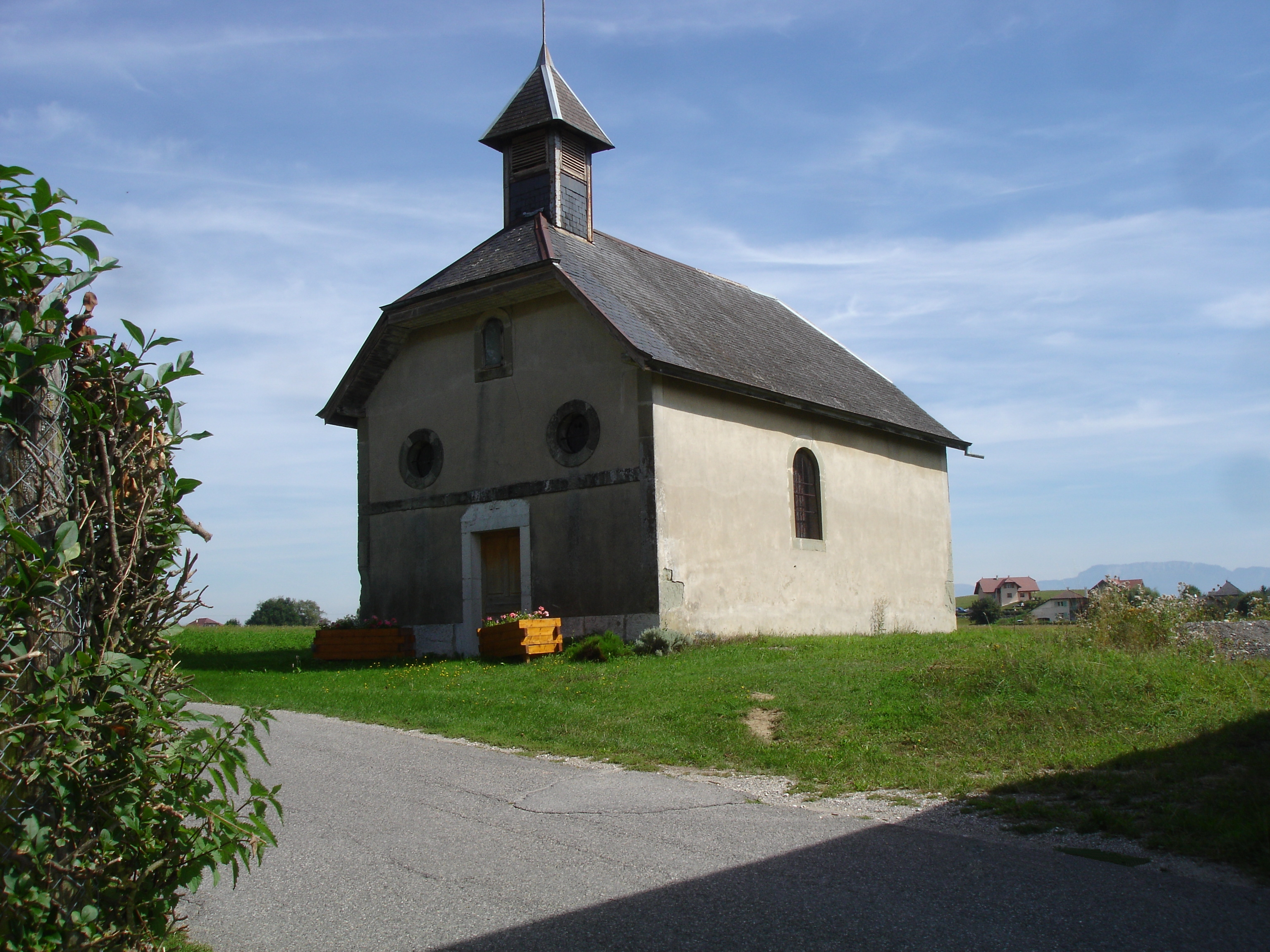 2010 Photo chapelle